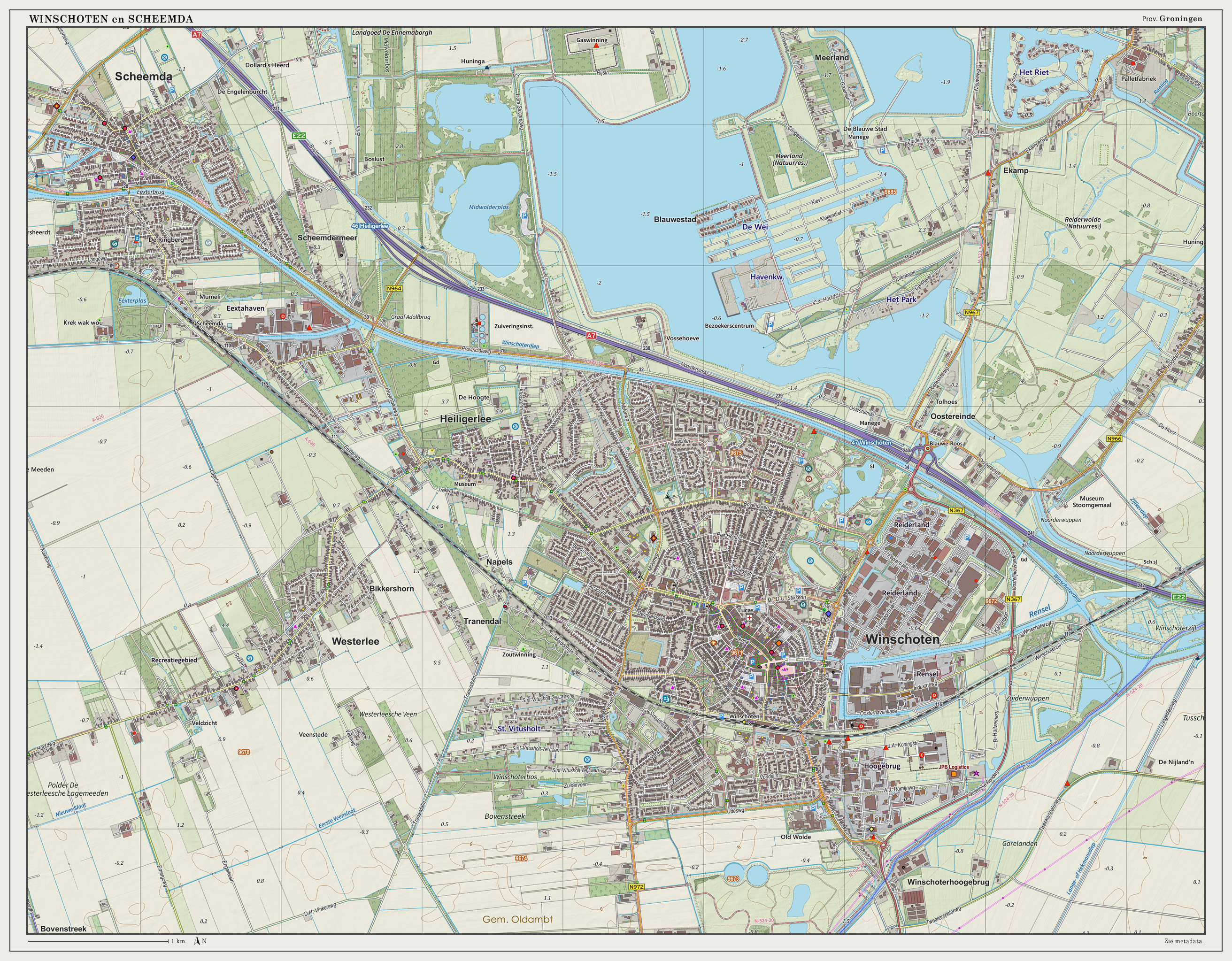 Topografische kaart van Winschoten (woonplaats). Resolutie: 300 pixels/km. Kaartbeeld samengesteld uit de open geodata van de Top10NL en Top25namen (Basisregistratie Topografie, Kadaster), Creative Commons BY licentie. Gebouwvlakken uit open geodata BAG extract. Wegen uit de OpenStreetMap. Reliëfschaduw uit de Actuele Hoogtekaart AHN2. Samenstelling en kleurenschema: Jan-Willem van Aalst, met QGIS2. Zie ook de Legenda.